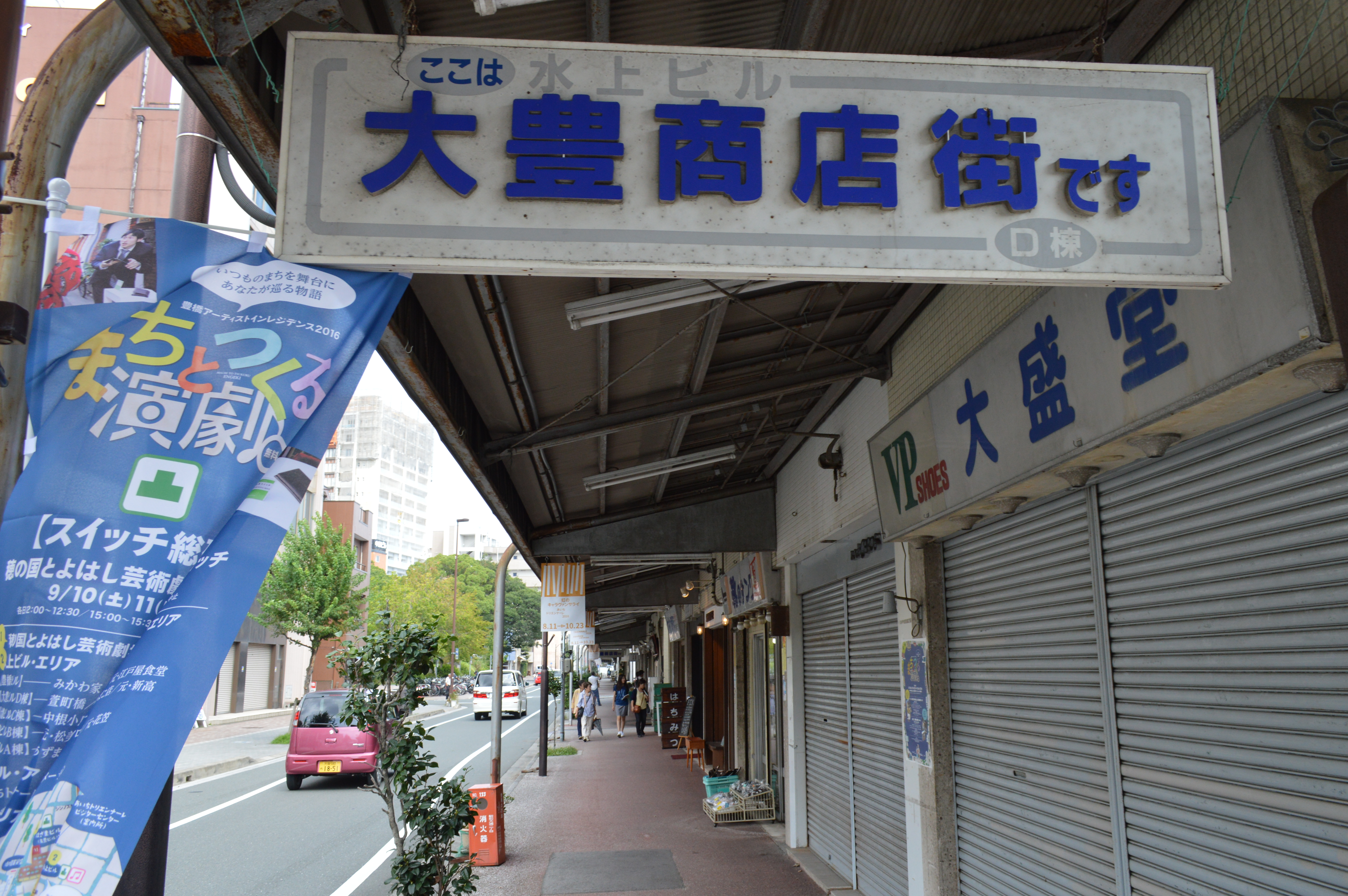 豊橋市の水上ビルのひとつ「大豊ビル」の大豊商店街。